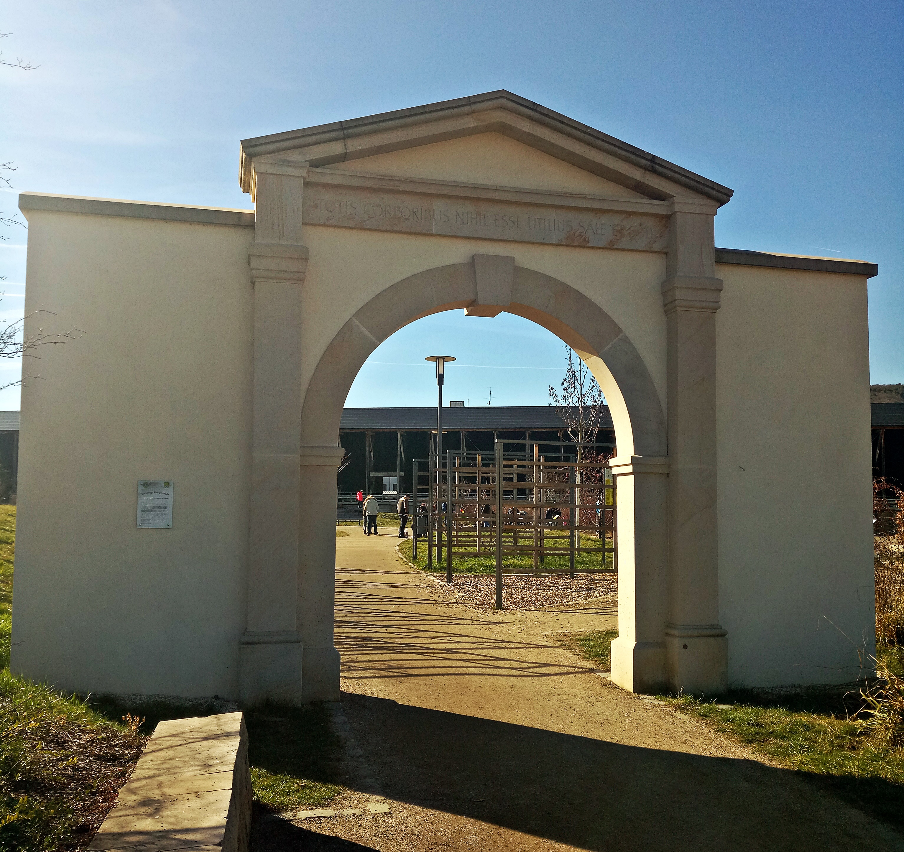 Bad Dürkheim, neues Salinentor nach dem alten Vorbild